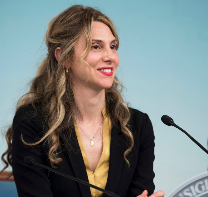 Ministra Madia